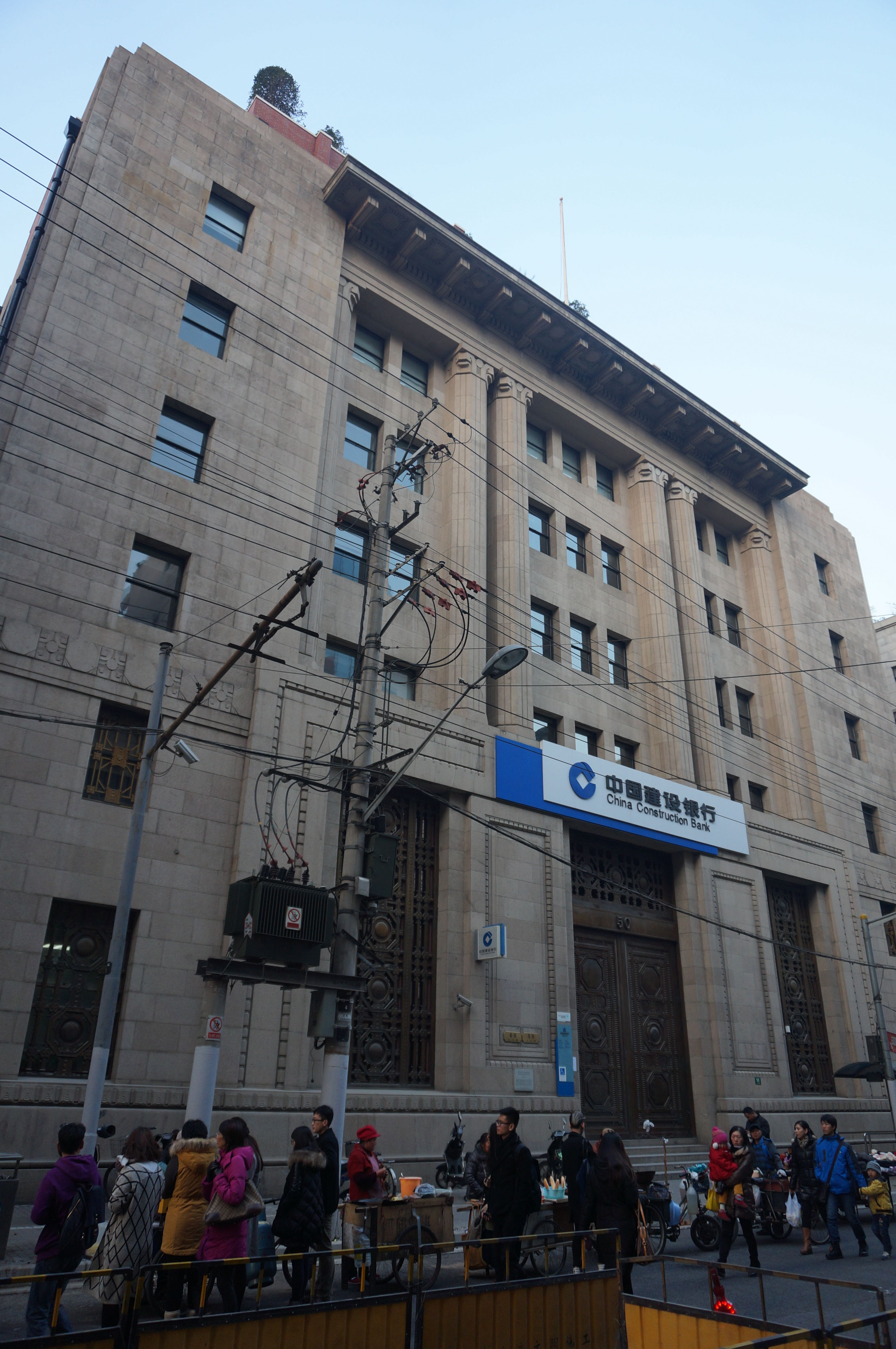 中文（中国大陆）: 上海市第二批优秀历史建筑——原三井银行大楼